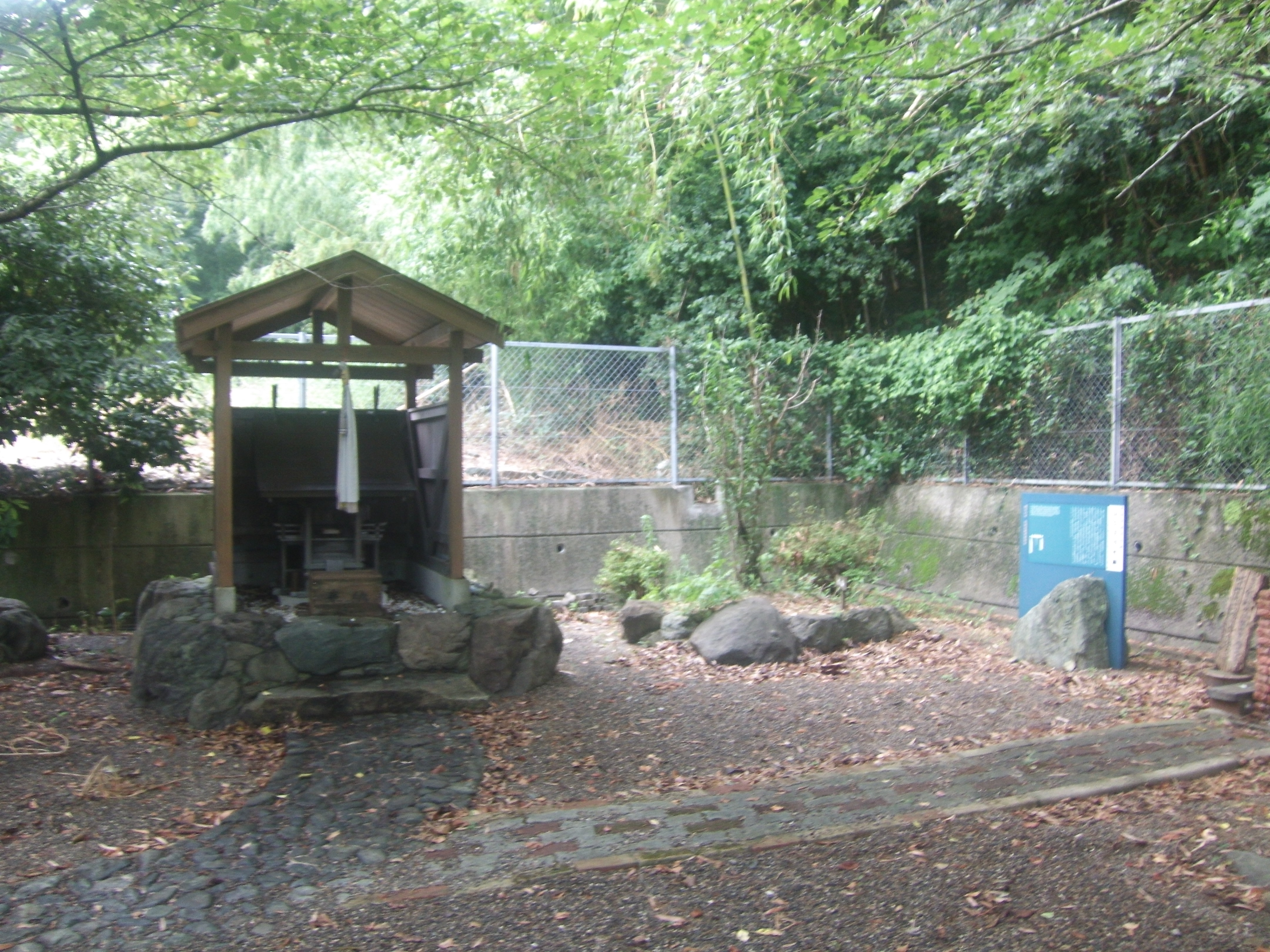 熊野古道・紀伊路の九十九王子の一つ山口王子（和歌山県有田市）